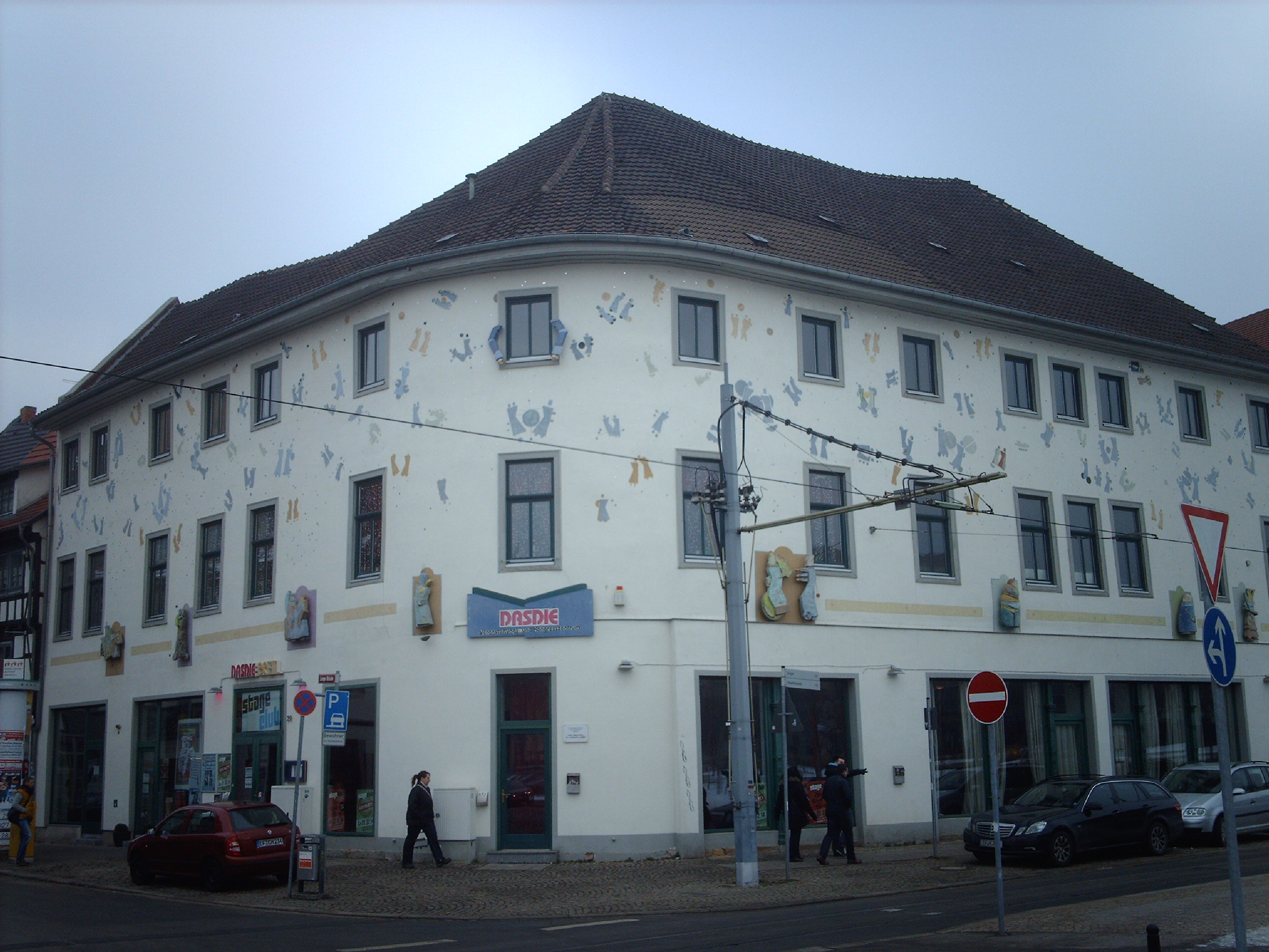 Ehemaliges Gasthaus "Zum Schlehendorn" in Erfurt, Ecke Regierungsstraße - Lange Brücke